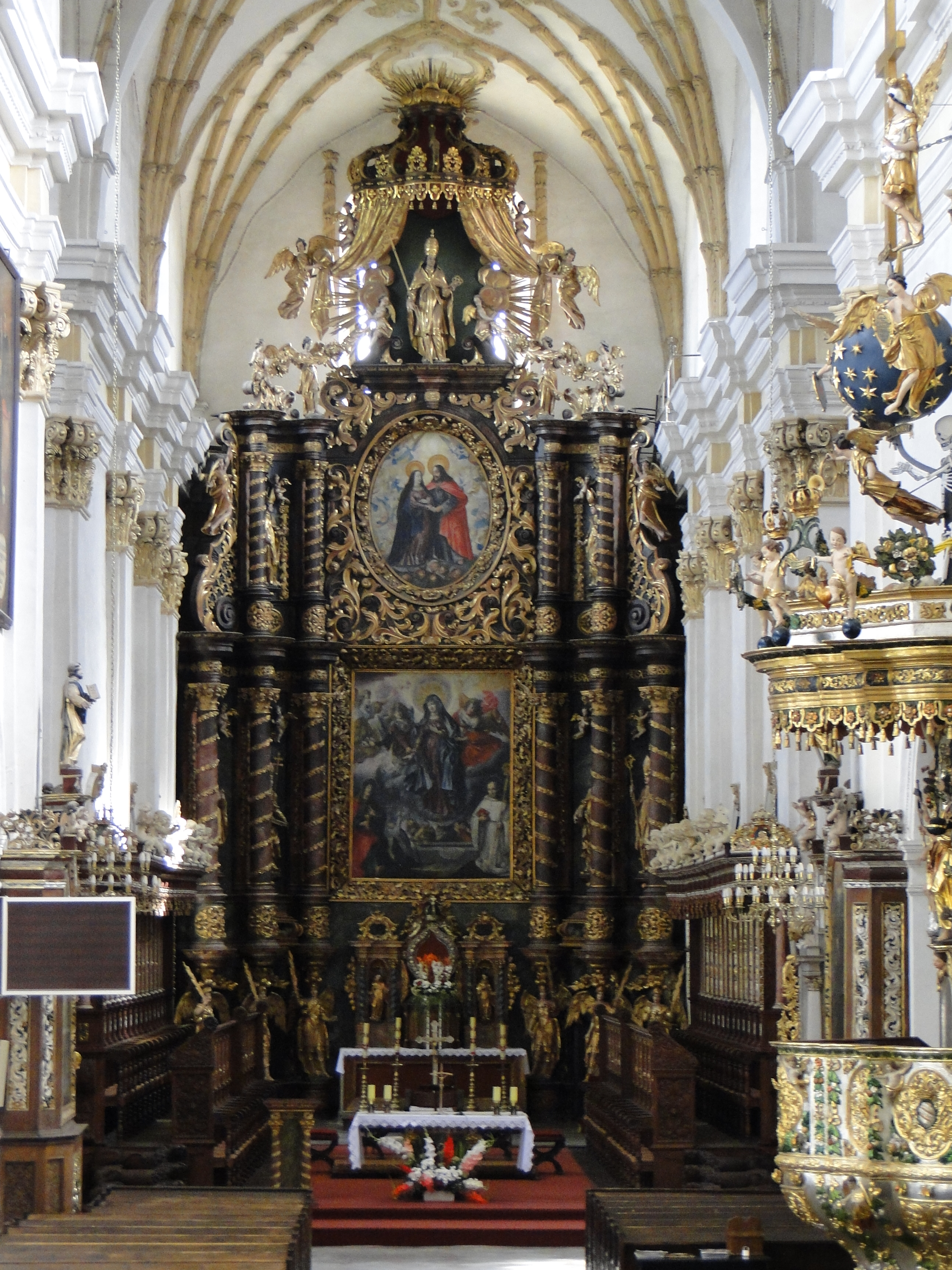 Koronowo - widok na ołtarz główny w Bazylice Mniejszej.